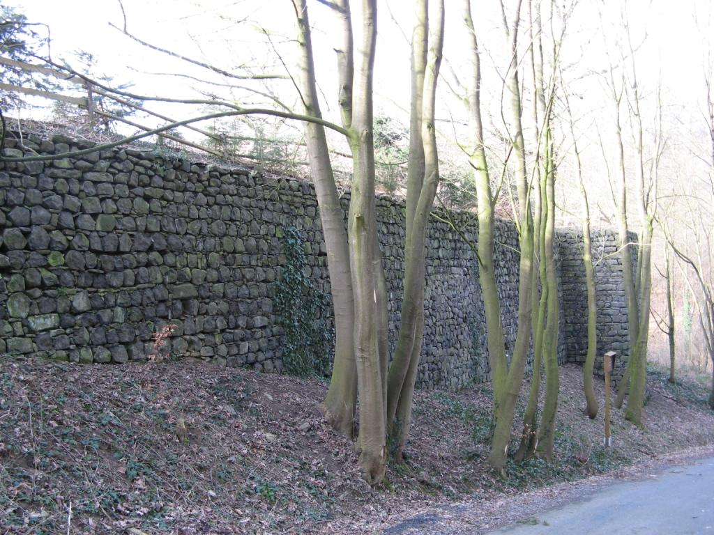 Stützmauer des ehemaligen Hof Wehrholz (Teil der Weilburger Schlossanlage)